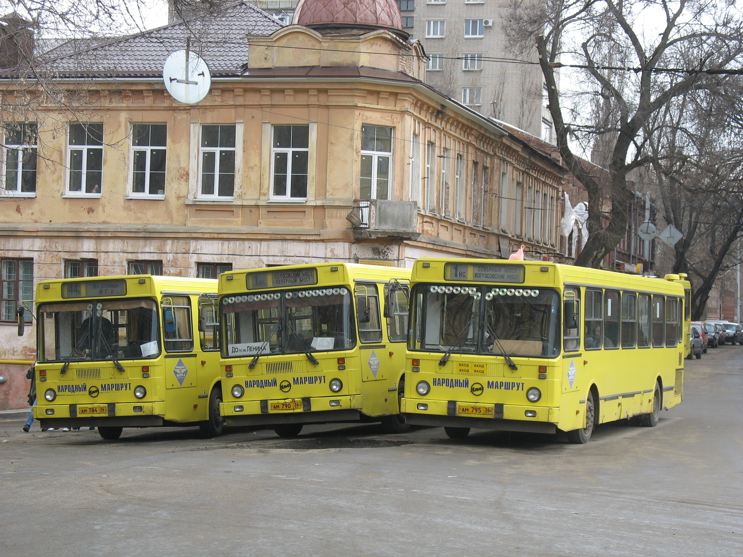 Народные автобусы